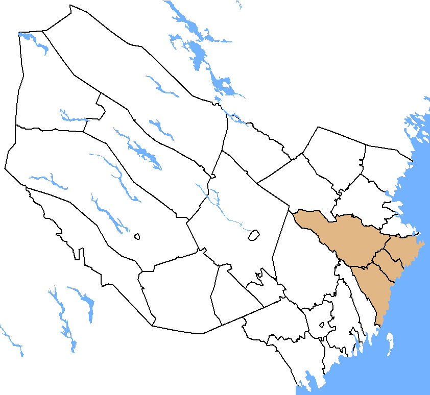 Mellanbygden ("Middle Clime") is an informal district in the middle between Skellefteå and Umeå.